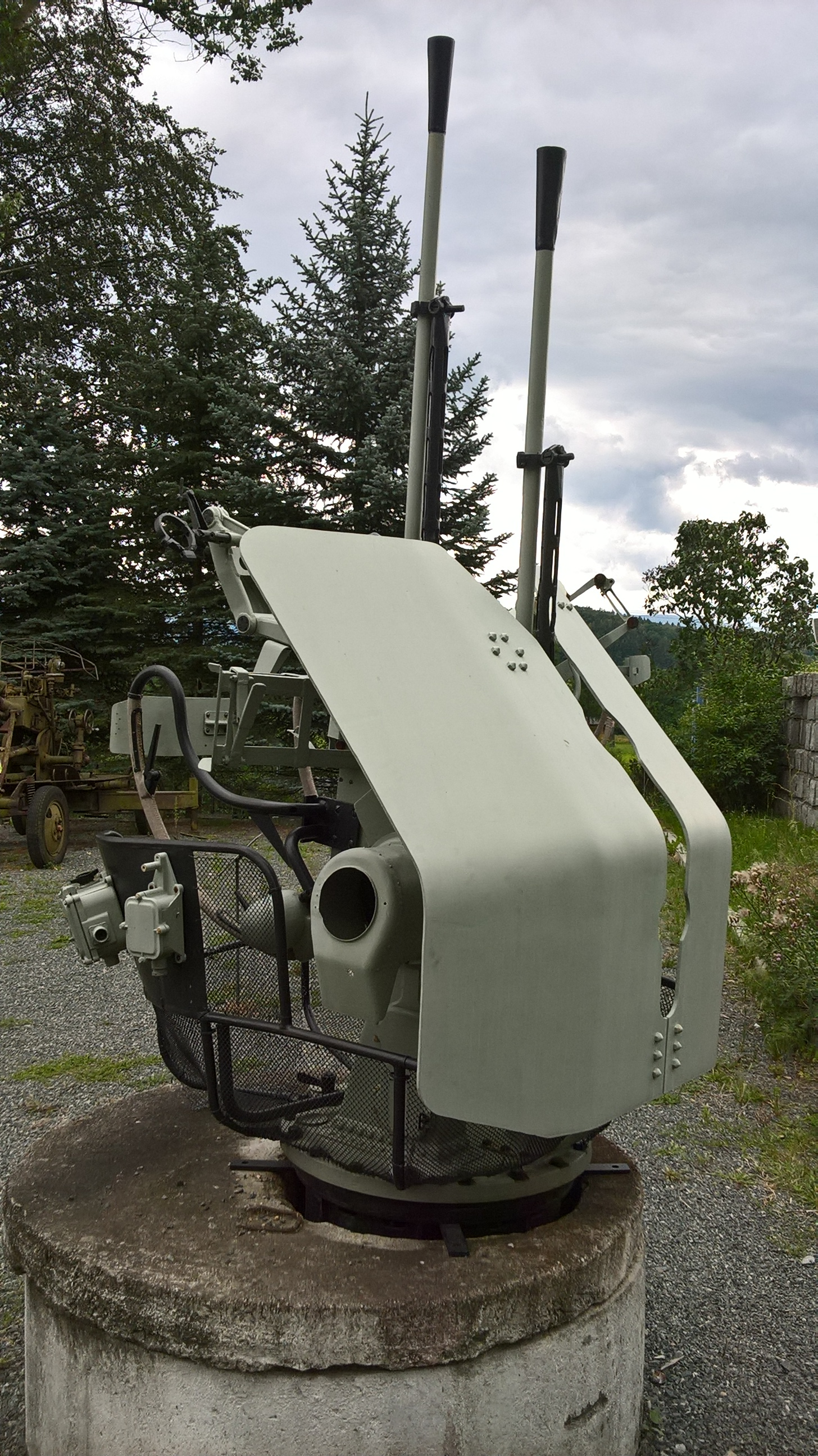 Zestaw 2M-7 kal. 14,5 mm w Skansenie Uzbrojenia Wojska Polskiego w Jeleniej Górze